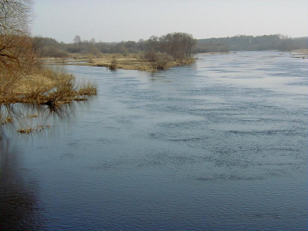 Aiviekste pie Ļaudonas 2002-03-29